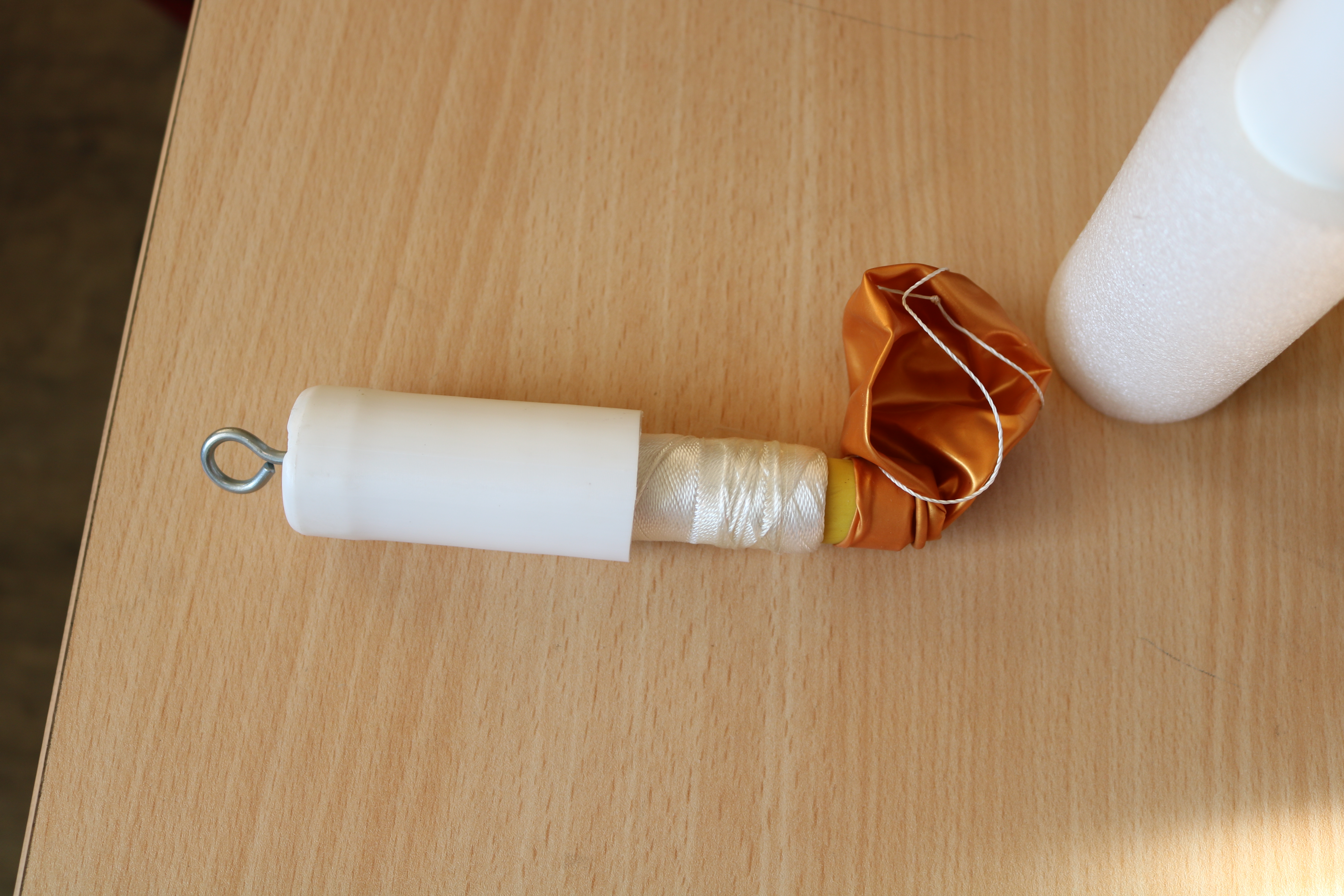 نخ بازکن بادکنک دار ساخت ایران که بر روی رادیوسند ایرانی دیجیسوند استفاده می شود